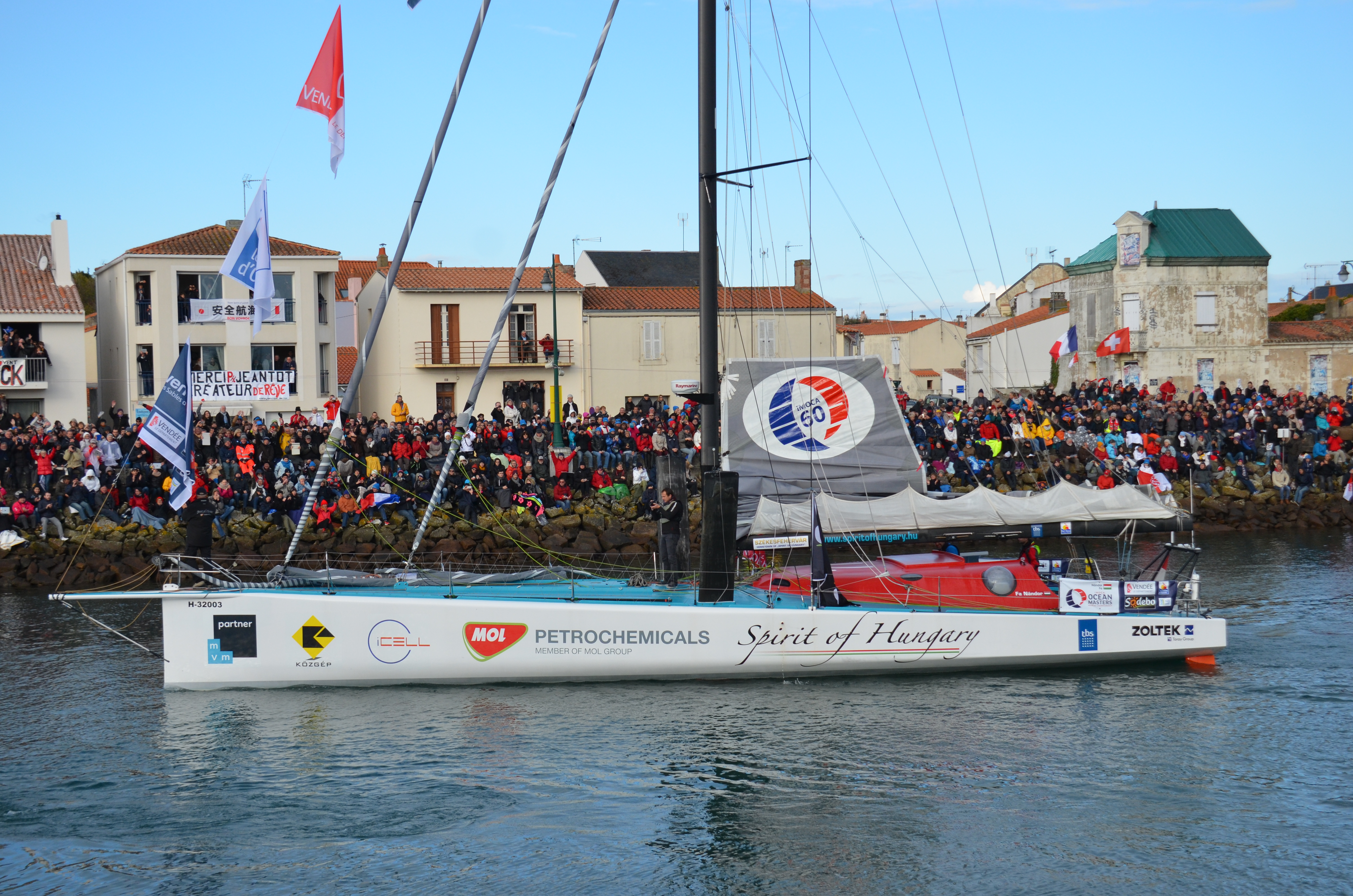 Spirit of Hungary, Nandor Fa au départ du Vendée Globe 2016-2017